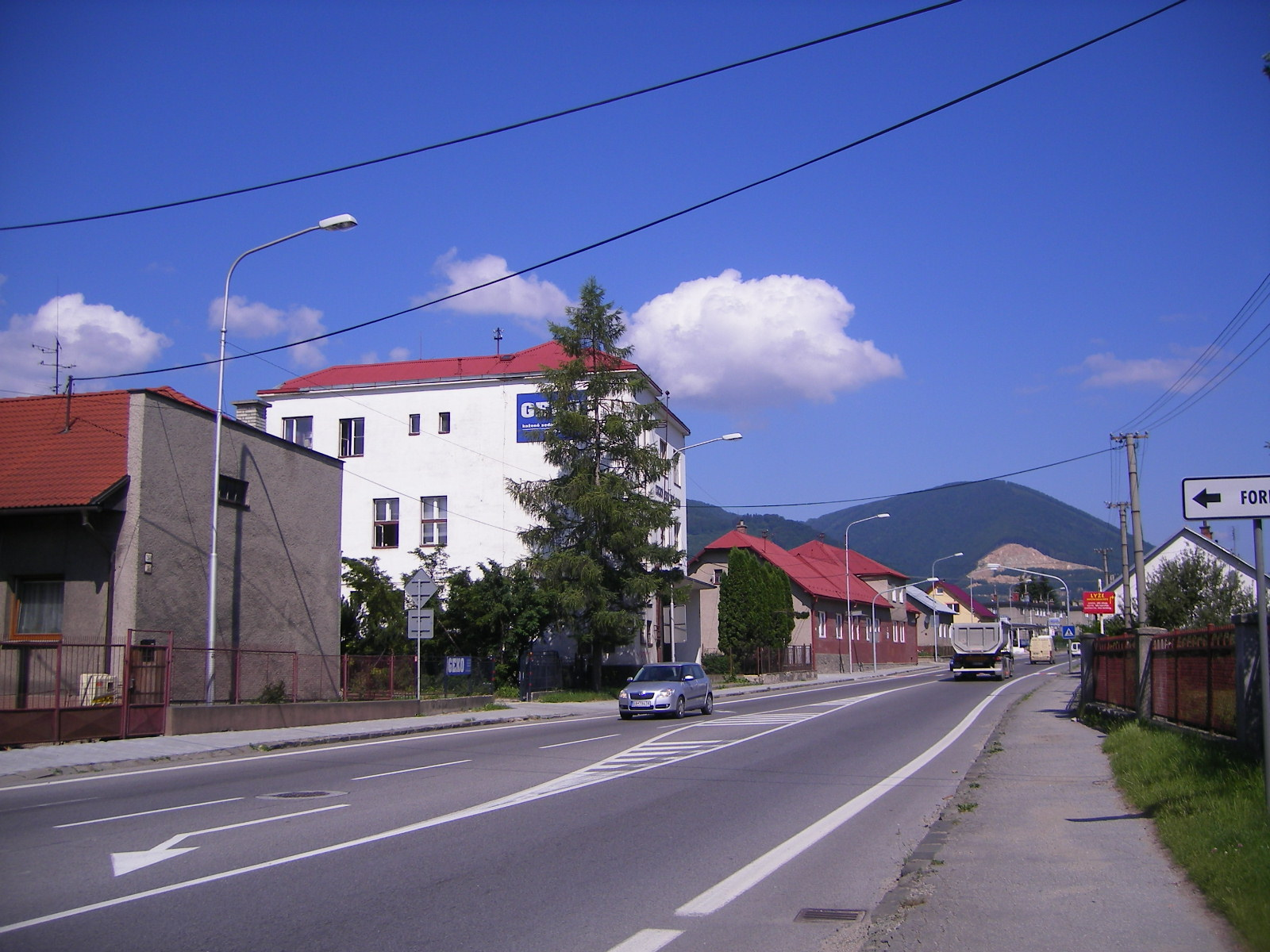 Vrútky - ulica Francúzskych partizánov